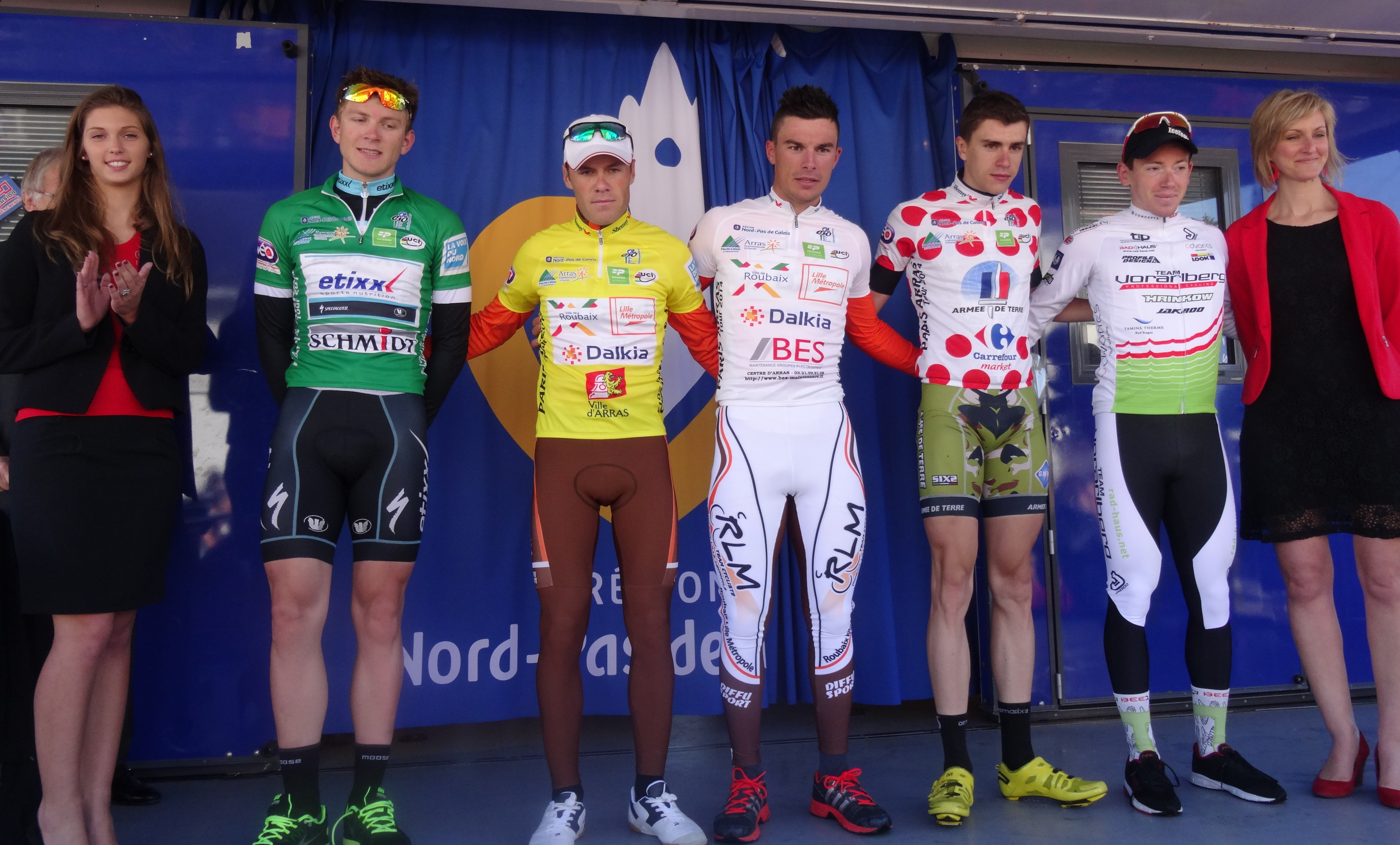 Reportage photographique réalisé le samedi 24 mai 2014 à l'occasion de l'arrivée de la deuxième étape du Paris-Arras Tour 2014 à Beaurains, Pas-de-Calais, Nord-Pas-de-Calais, France.